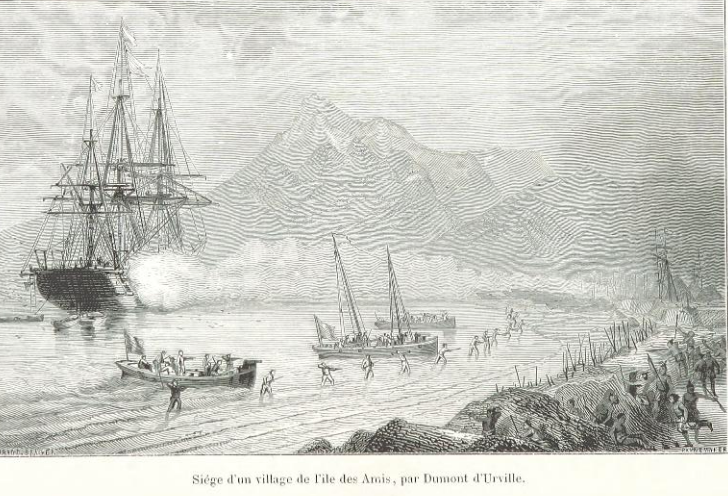 Arthur Mangin, Voyages et Découvertes outre-mer au XIXe siècle, illustrations par Durand-Brager, 1863 ː siège d'un village de l'île des amis par Dumont d'Urville.